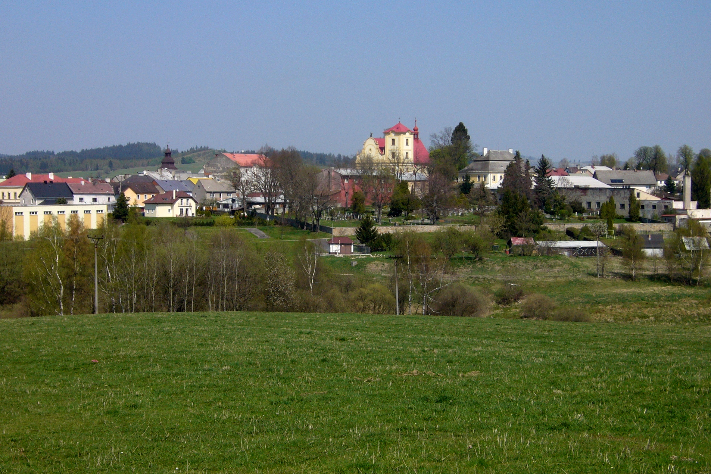 Bochov - celkový pohled z cesty ke zřícenině Hartenštejn